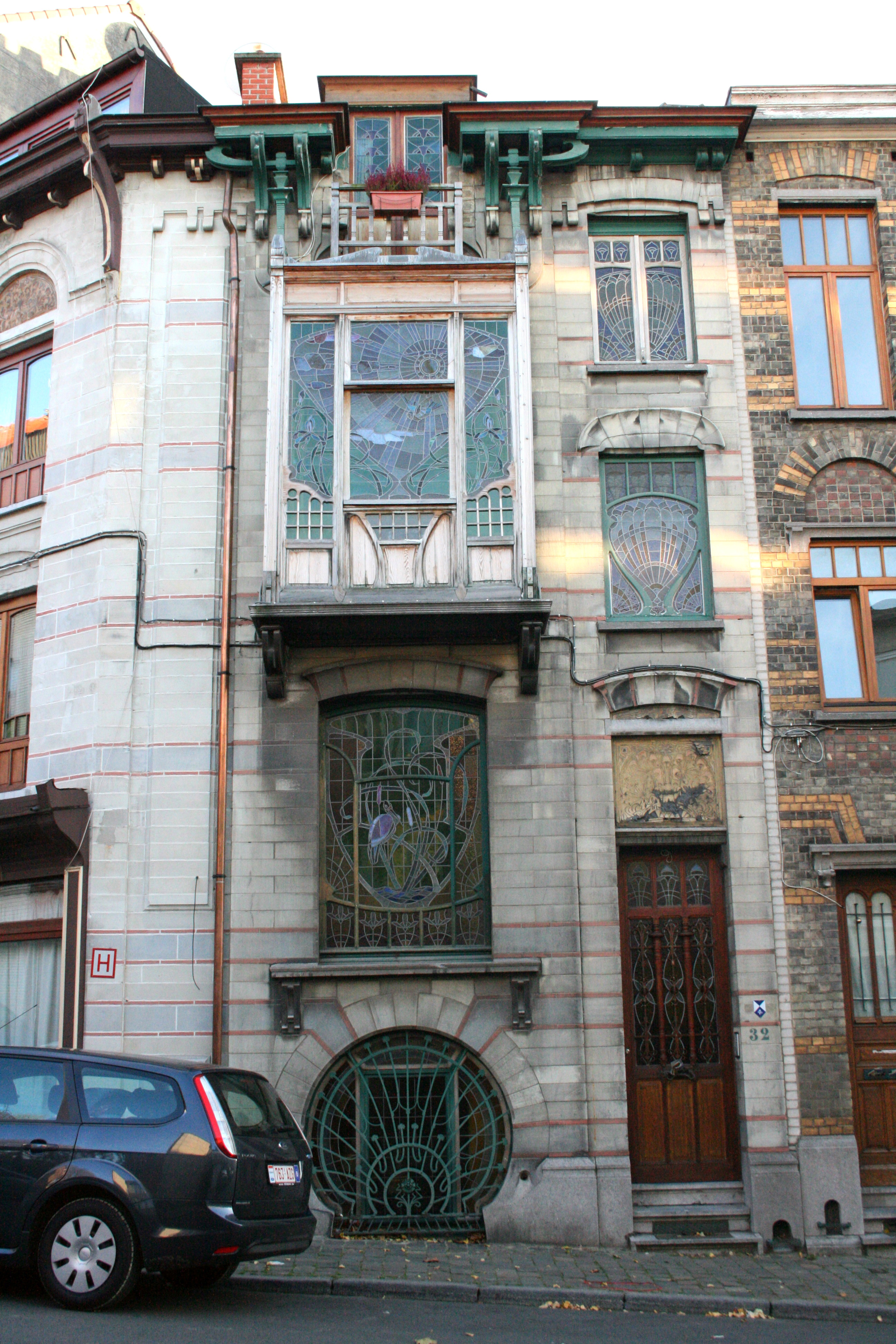 Rue Van Hasselt 32, Schaerbeek (Bruxelles), Belgique. Maison style Art Nouveau. Architecte : Gaspard Devalck (1900)